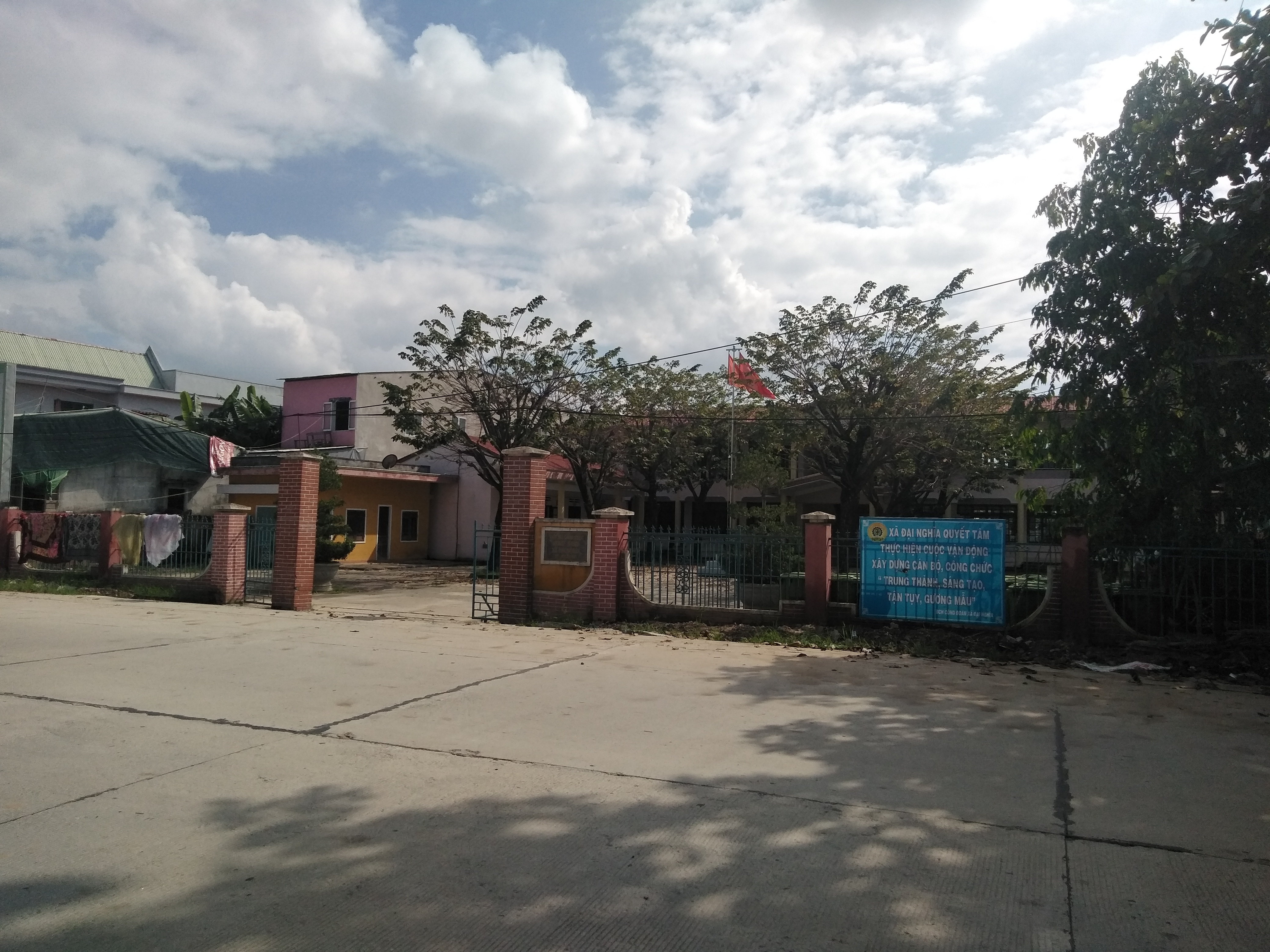 UBDN xã Đại Nghĩa, Đại Lộc, Quảng Nam